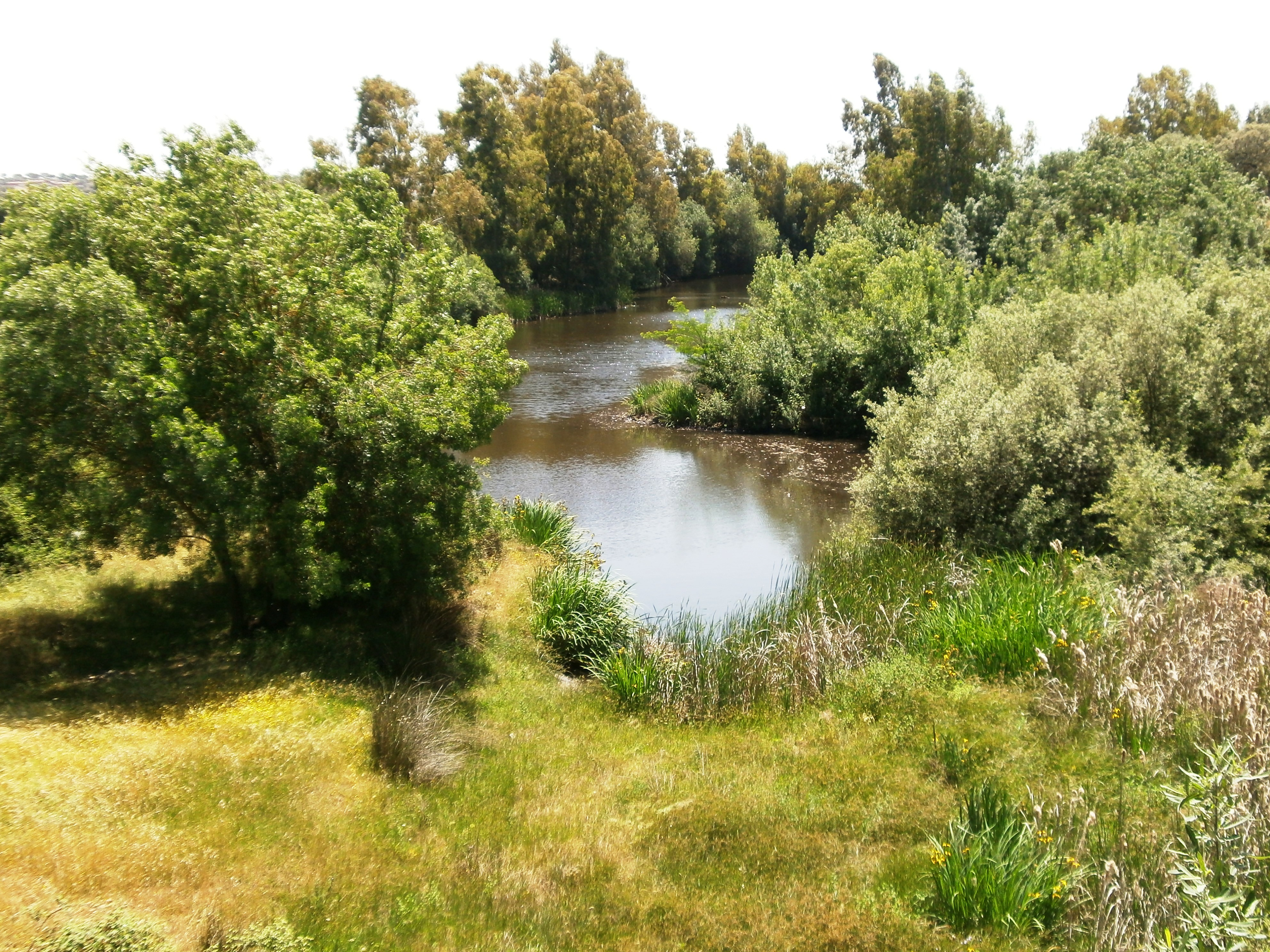 Río Gevora Bajo, afluente del Guadiana por la derecha, muy poco antes de su desembocadura. This is a photography of a Special Area of Conservation in Spain with the ID: ES4310059. Natura2000 entry, EEA entry